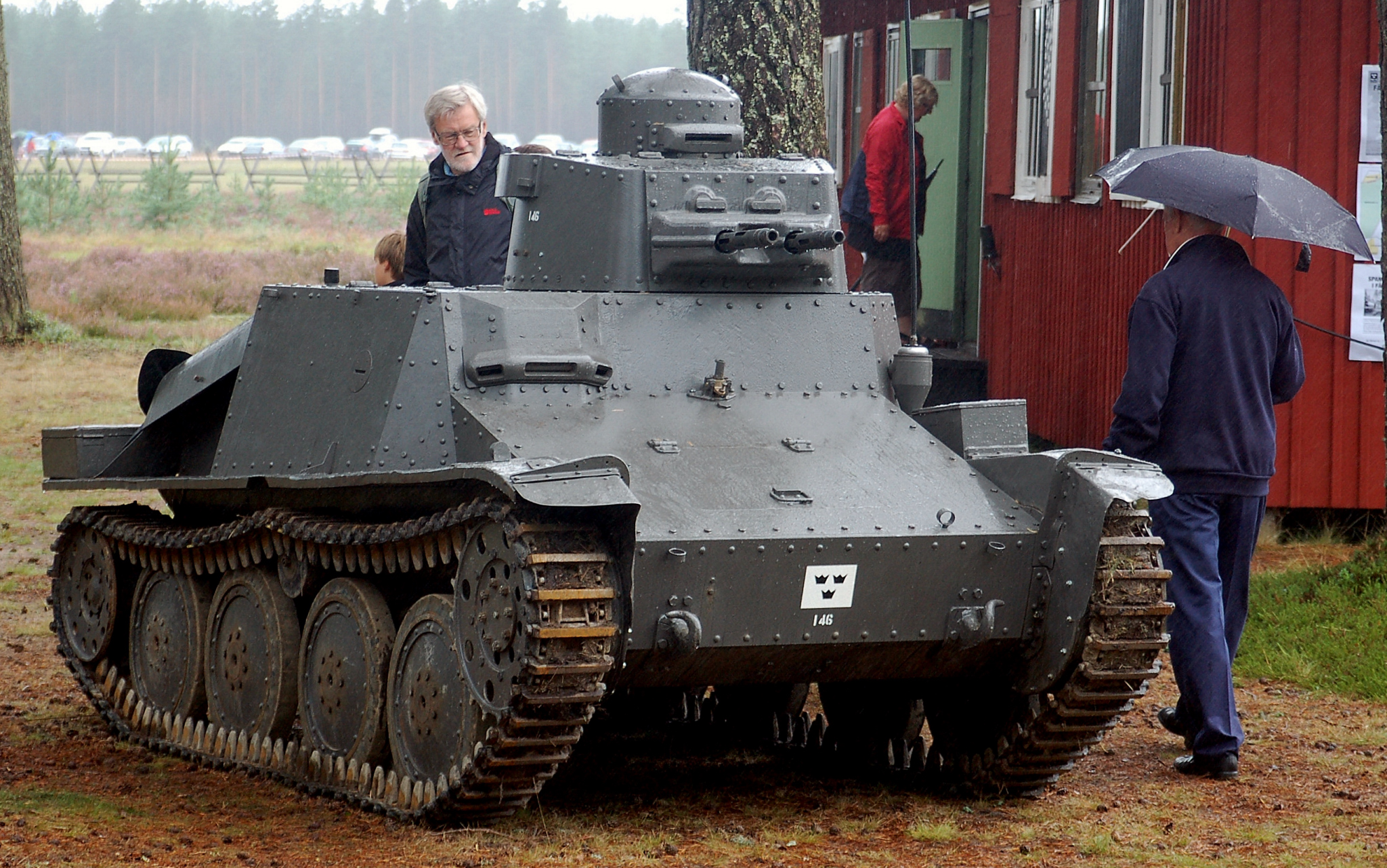 Stridsvagn m/37 vikt 4.5 ton Besättning 2 man Pansar 6 - 15mm Motor Volvo FC-CKD, 85hk Maxfart 60 km/h Beväpning 2 x 8mm ksp m/36 strv V+H Byggår 1938-39 Antal i tjänst 48 st